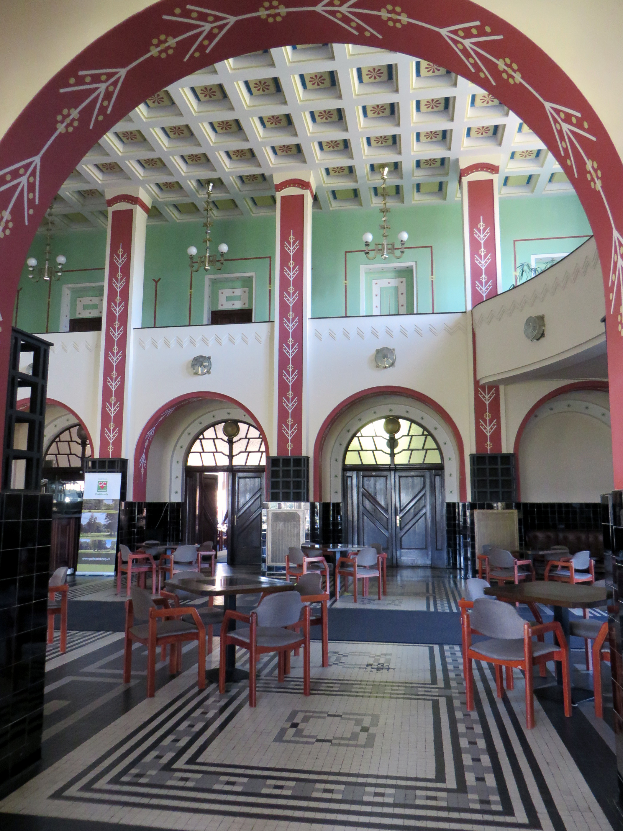 Radiostanice v Poděbradech – interiér vstupní haly.